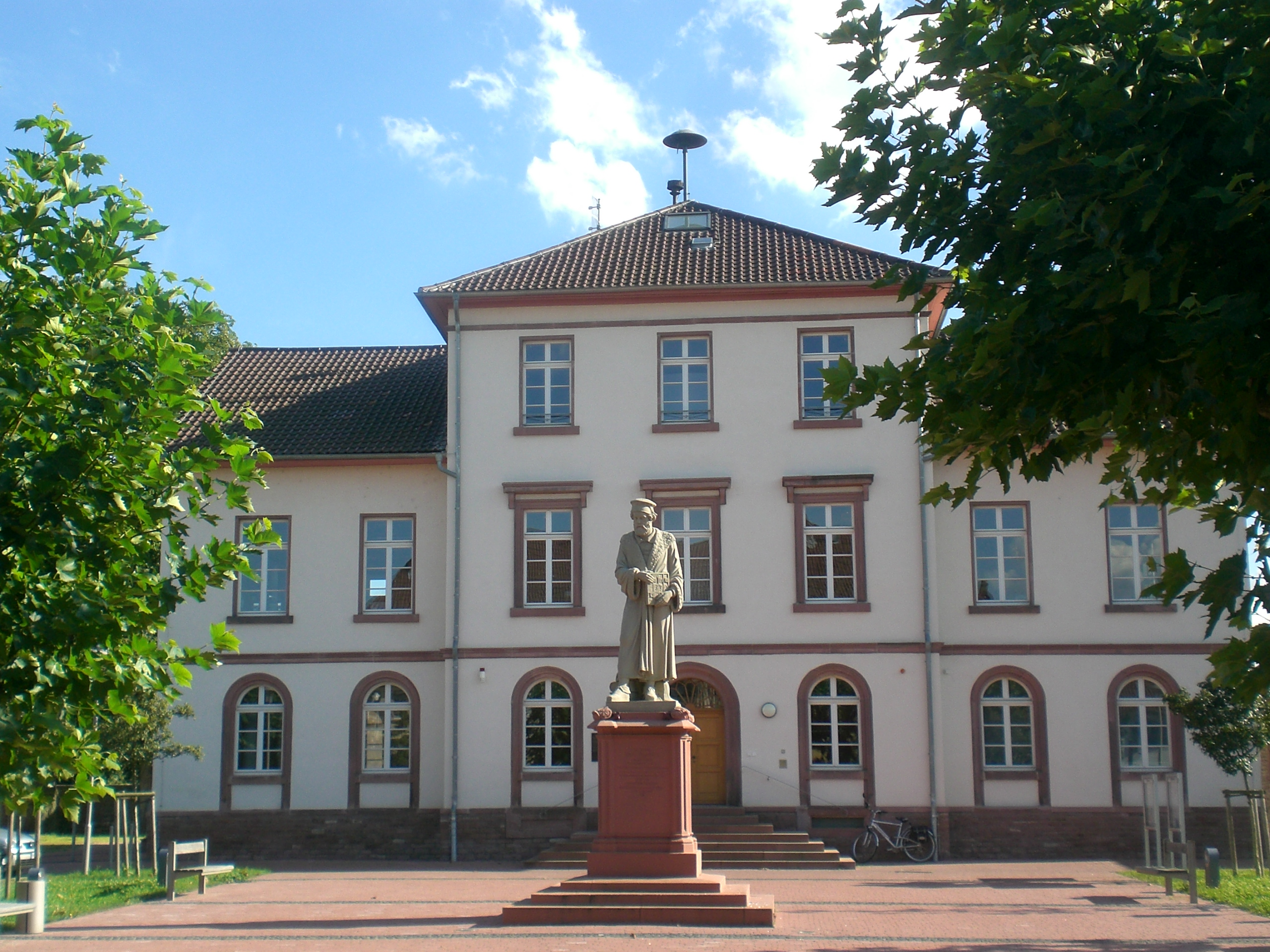 statuo kaj domo de Peter Schöffer ĉe samnoma placo en Gernsheim, Hesio